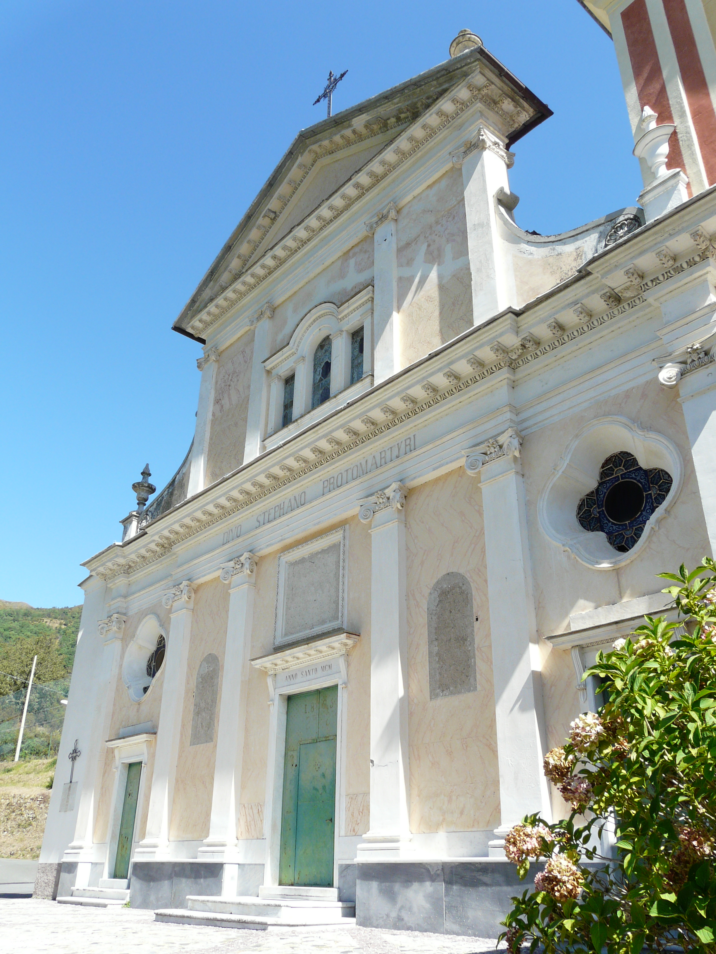 Chiesa di Santo Stefano, Cichero, San Colombano Certenoli, Liguria, Italia